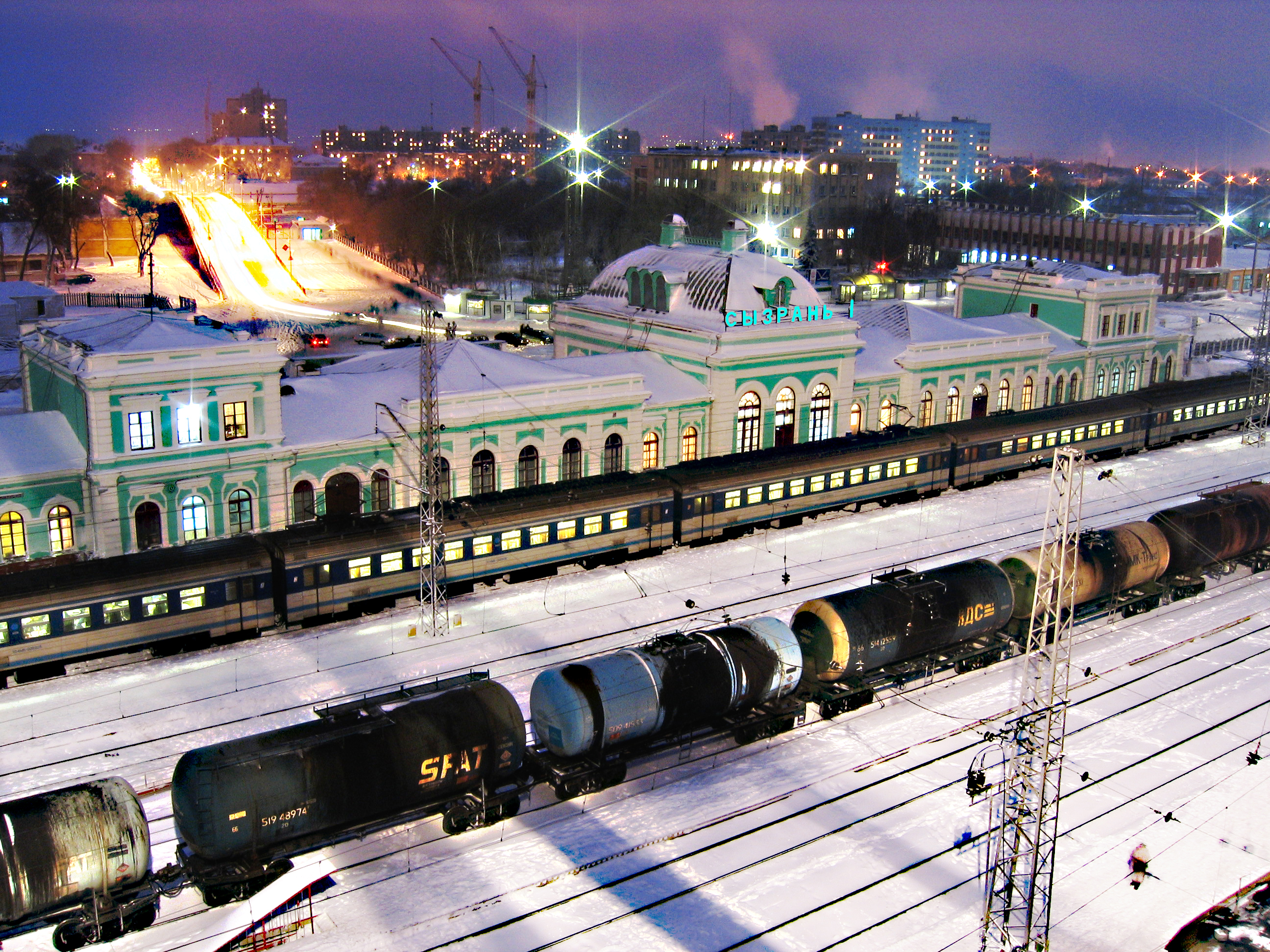 Железнодорожный вокзал станции Сызрань (1874)